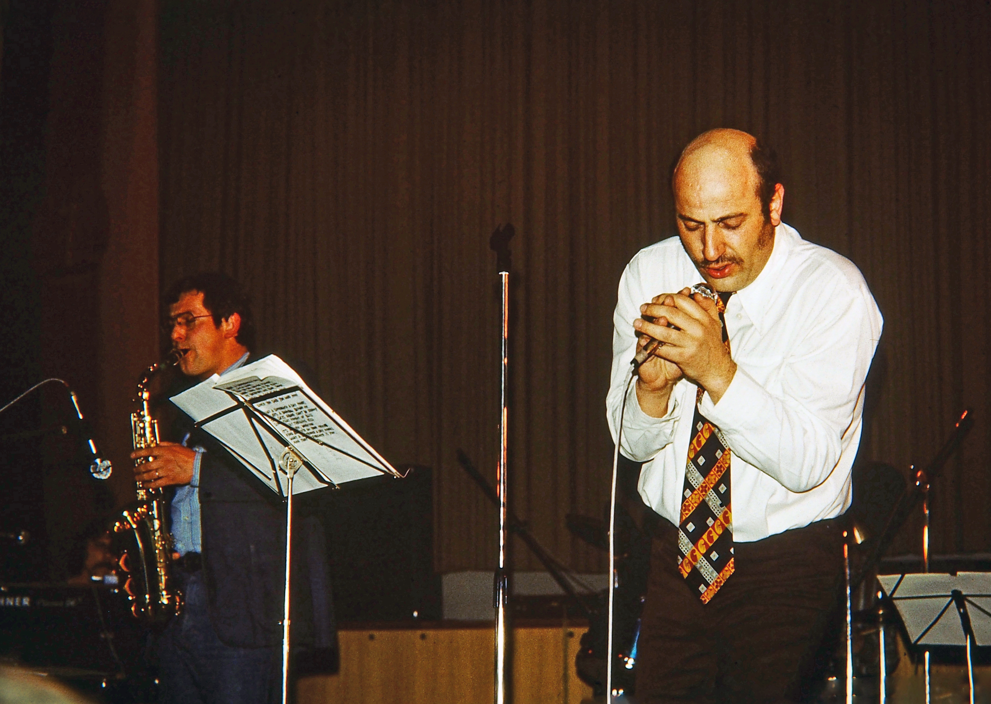 Günther Fischer (links) und Manfred Krug, Konzert am 18. Januar 1977 in Freiberg (Sachsen). Da Krug das Protestschreiben gegen die Ausbürgerung von Wolf Biermann unterzeichnet hatte, wurden die Konzertkarten ausschließlich über die FDJ-Leitung der Bergakademie Freiberg vergeben. Damit wollte man wahrscheinlich unliebsame Sympathiekundgebungen unterbinden. Die Rechnung ging aber in Freiberg nicht auf: Am frenetischen Beifall war zu erkennen, dass in der überwältigenden Mehrheit die echten Fans anwesend waren – sicher neben Stasi-Mitarbeitern, die sich aber nicht zu erkennen gaben.